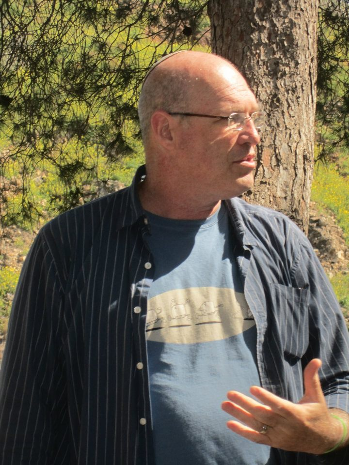 גבי ברזילי